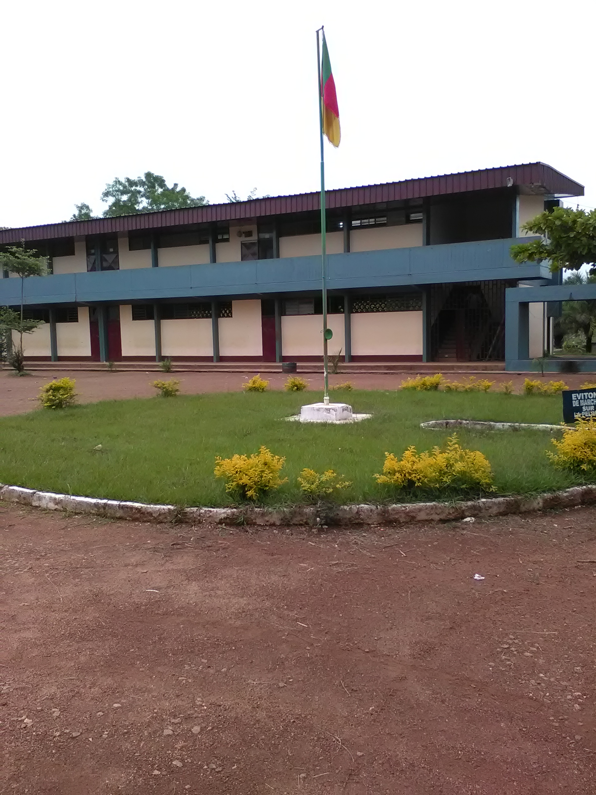 mât du drapeau du Cameroun au Lycée Classique et Moderne de Bafia